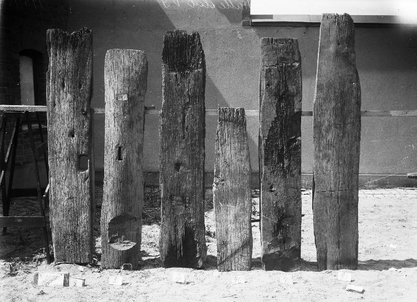 Fragment från stavkyrkan. Kategori: (01) Exteriörer, detaljer Fragment från stavkyrkan.